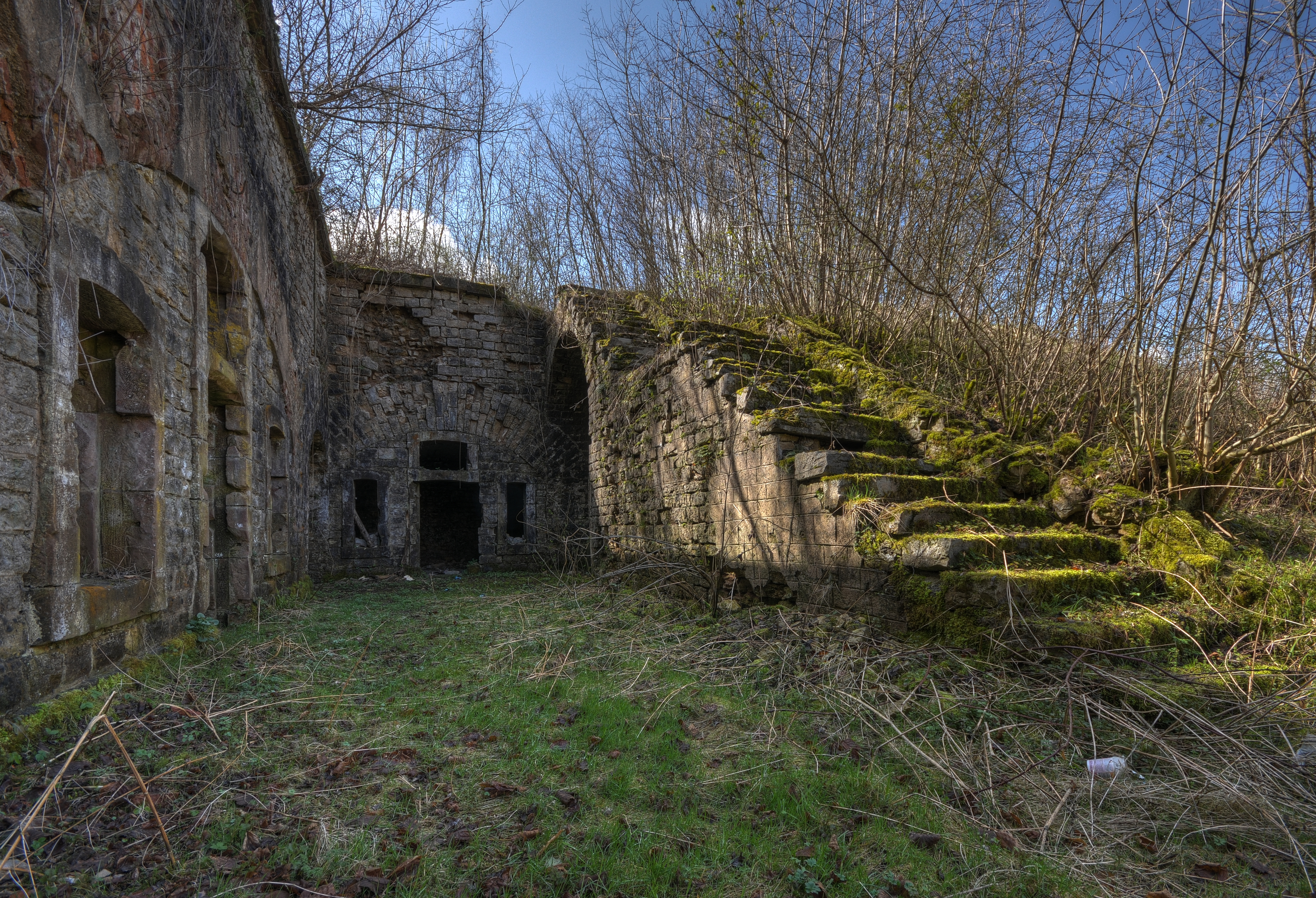 This photograph was taken with a Nikon D300 Fort des Hautes Perches : une partie du casernement principal avec un escalier permettant d'accéder sur les dessus (HDR).